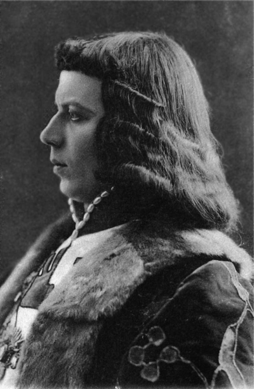 И. В. Грызунов — Герцог («Скупой рыцарь» С. В. Рахманинова). 1906 г.